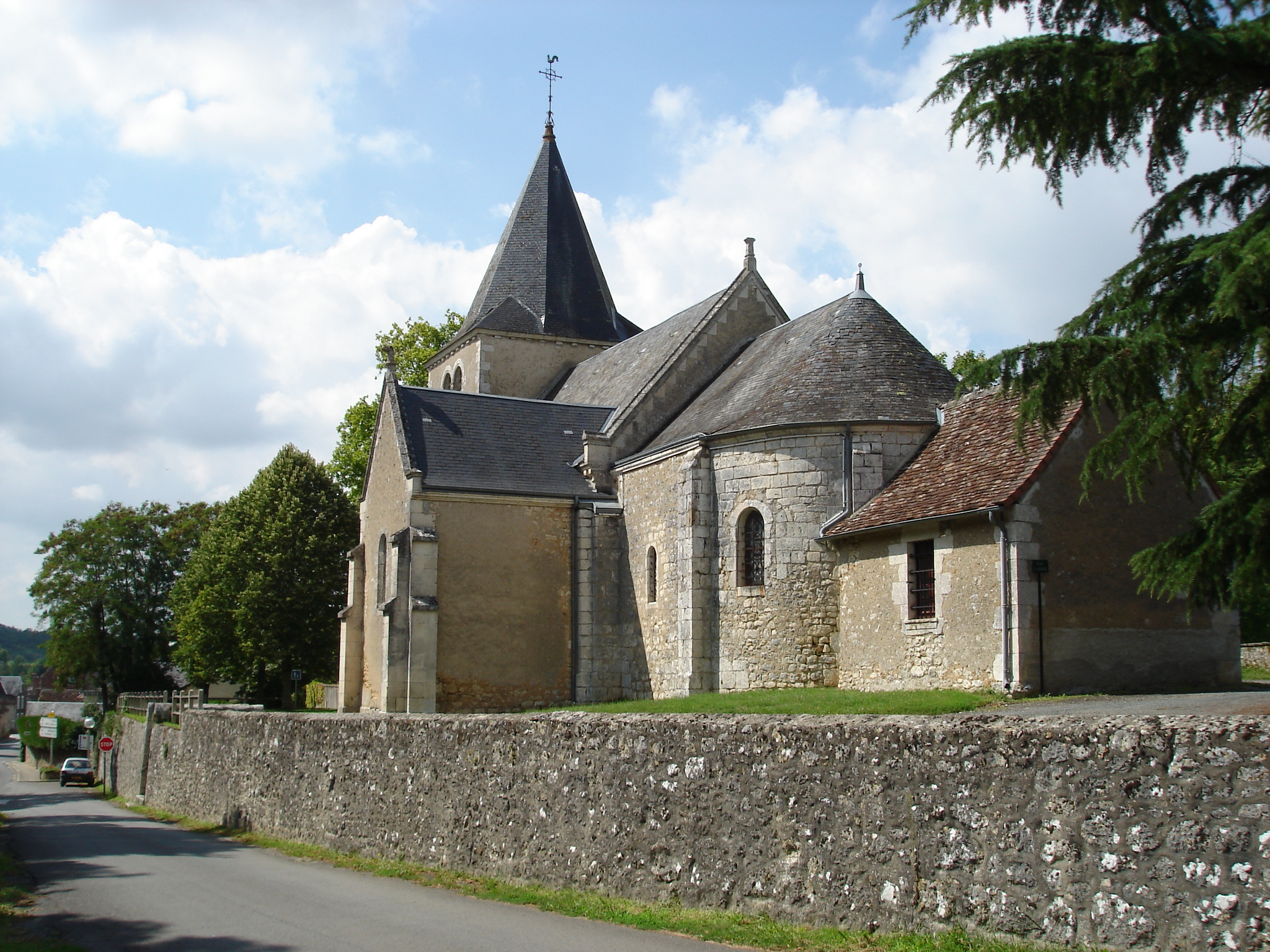 Fontgombault (36) : L'église Saint-Jacques.